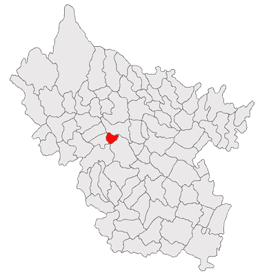 Categorie:Hărţi ale judeţului Buzău